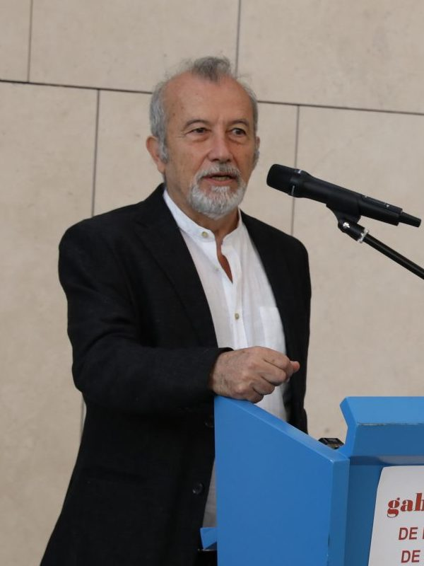 La portavoz del Gobierno municipal, Rita Maestre, ha presentado la Primera Jornada de Puertas Abiertas de los Gabinetes de Dibujos y Estampas de Madrid, acompañada del comisario de Gabinetes Abiertos, Víctor Campo, y del director de la Calcografía Nacional de la Real Academia de Bellas de San Fernando, Juan Bordes. Se trata de un proyecto pionero que se celebra por primera vez en España el próximo 26 de mayo. La novedad es la apertura al público de espacios museísticos, una especie de ‘salas secretas’, que albergan obras que no se exponen habitualmente debido a la fragilidad de su soporte, el papel, y a las condiciones especiales que requieren para su conservación.